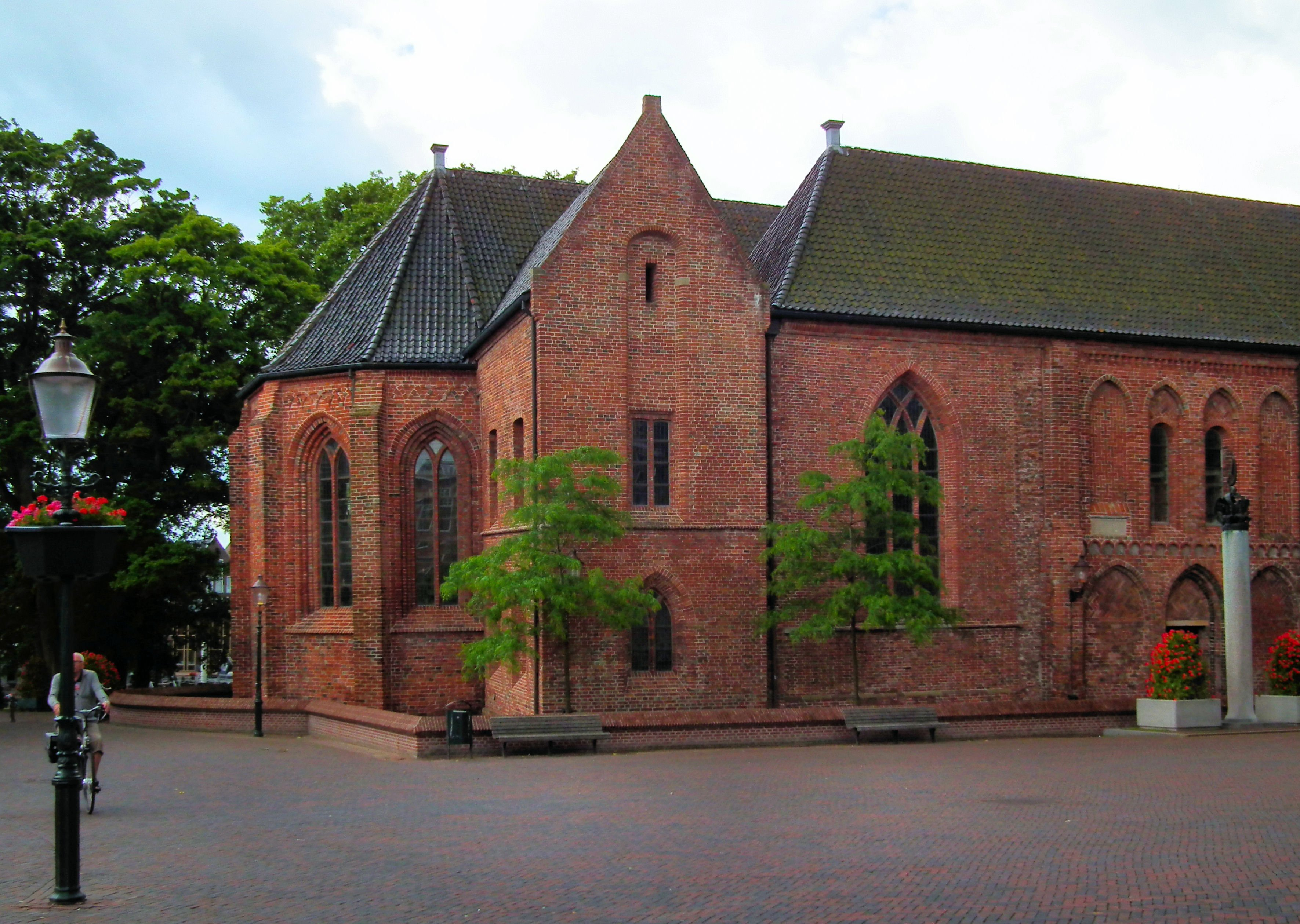 Het historische centrum van Appingedam (NL) - Nicolaikerk